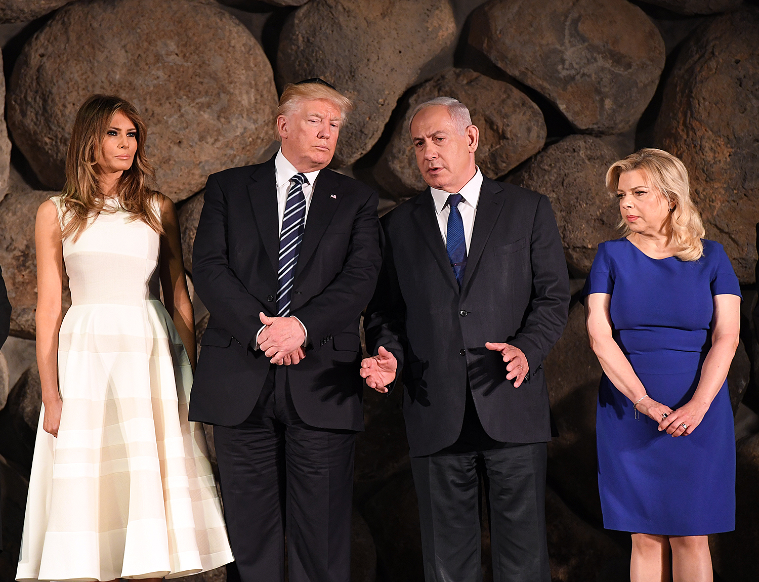 DSC_3880F